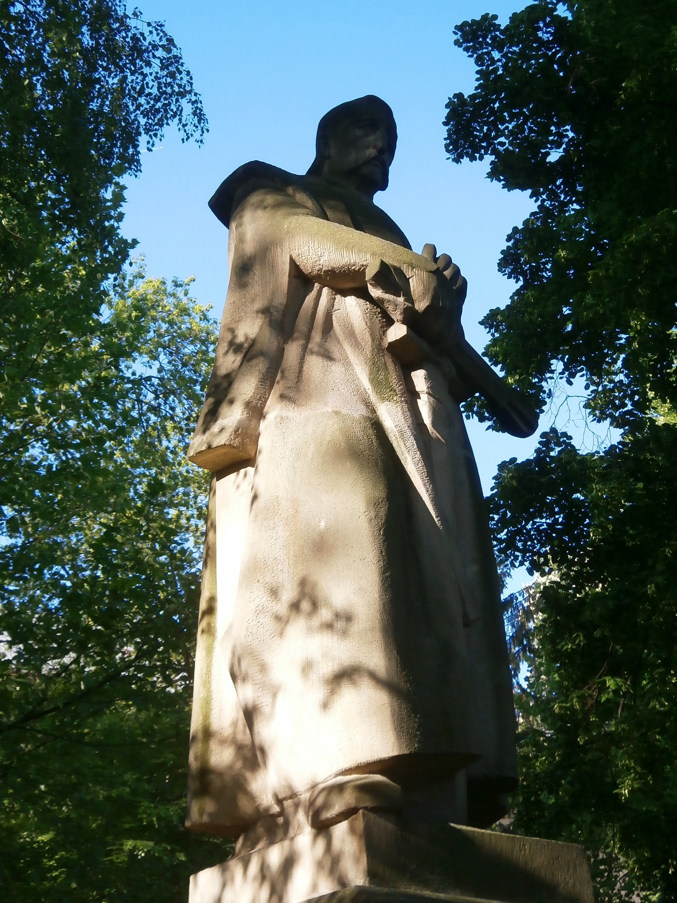 Pomník Jana Žižky z Trocnova (Hradec Králové)